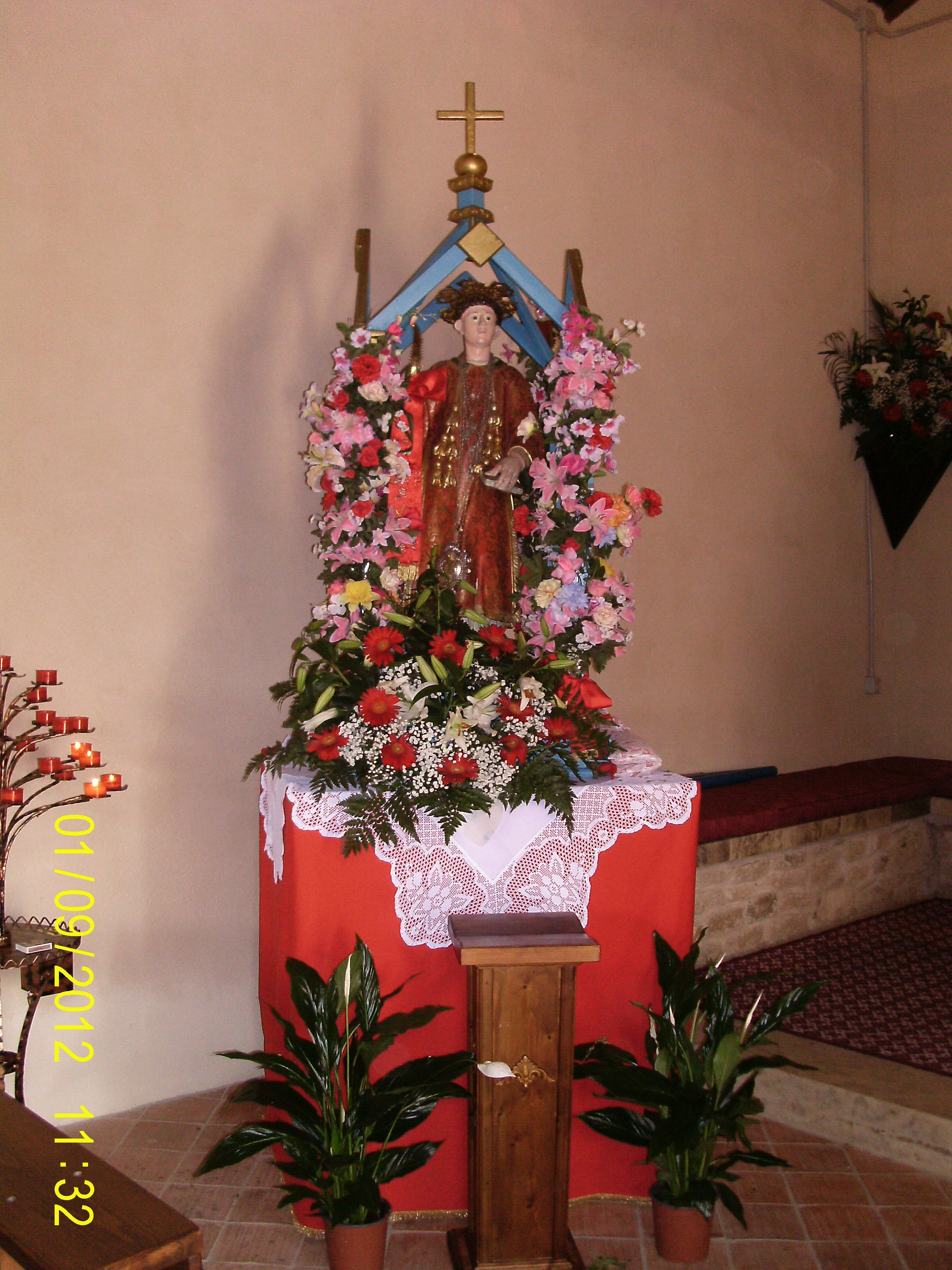 Siris, interno della chiesa di San Vincenzo: simulacro del santo il giorno della festa.